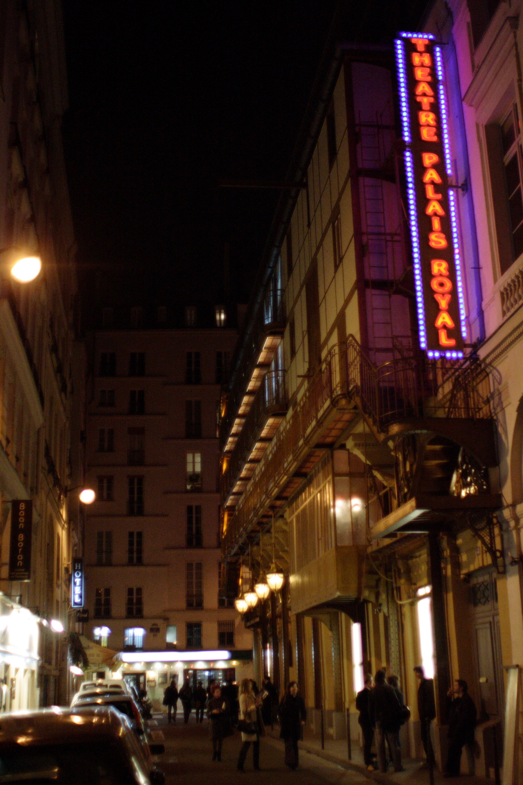 Théâtre du Palais-Royal, Paris